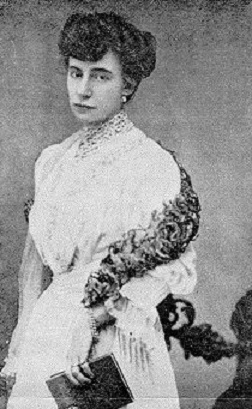 Maria Majocchi Plattis